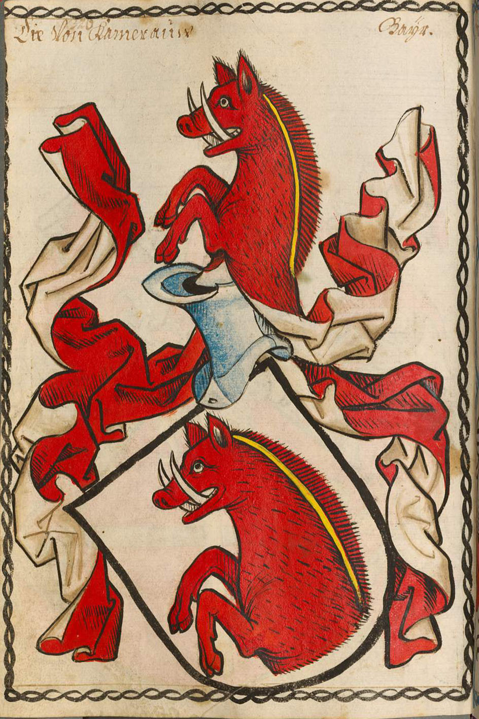 Scheibler'sches Wappenbuch , älterer Teil Bayern Seite 326